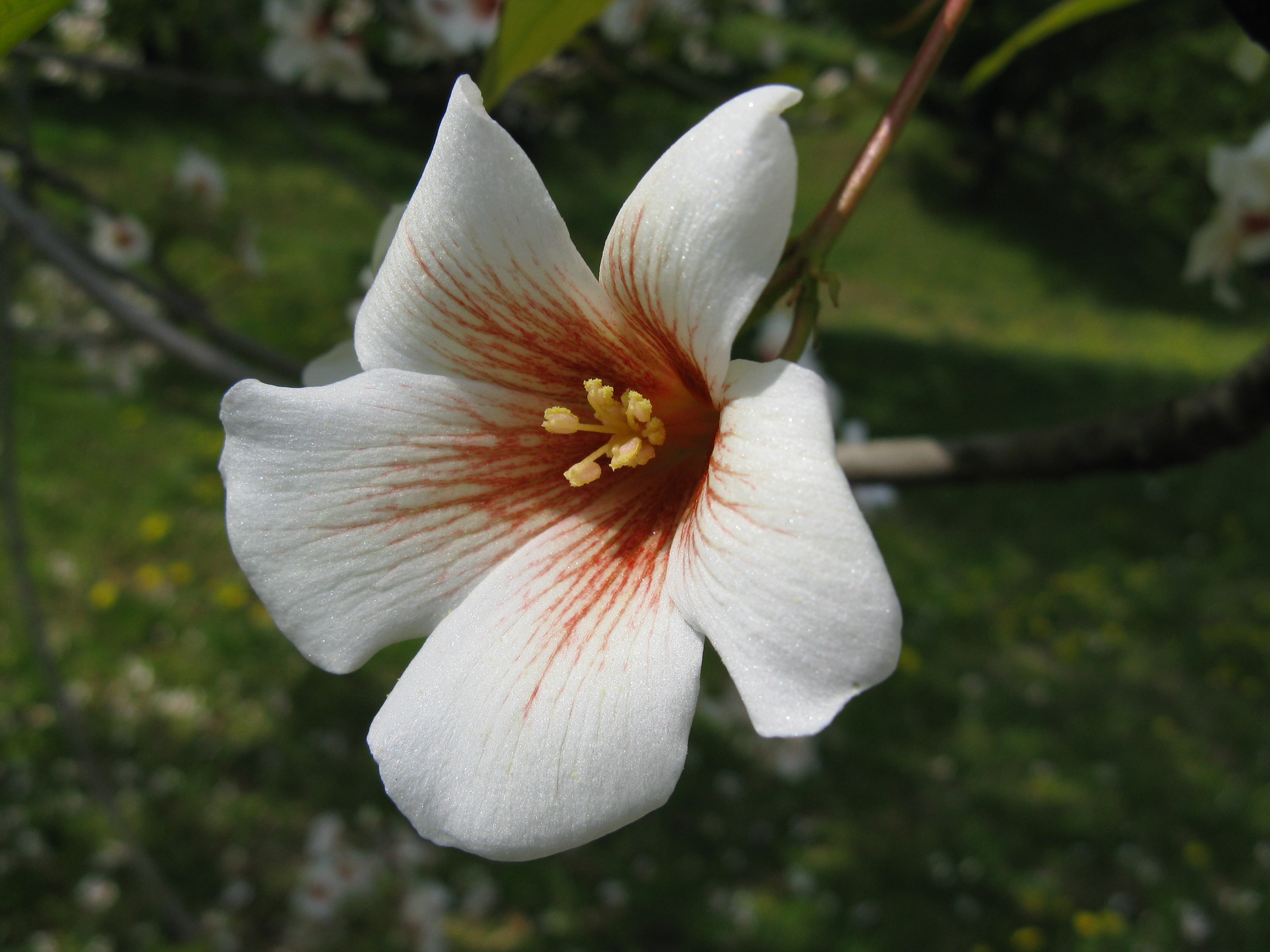 Scientific name Vernicia fordii